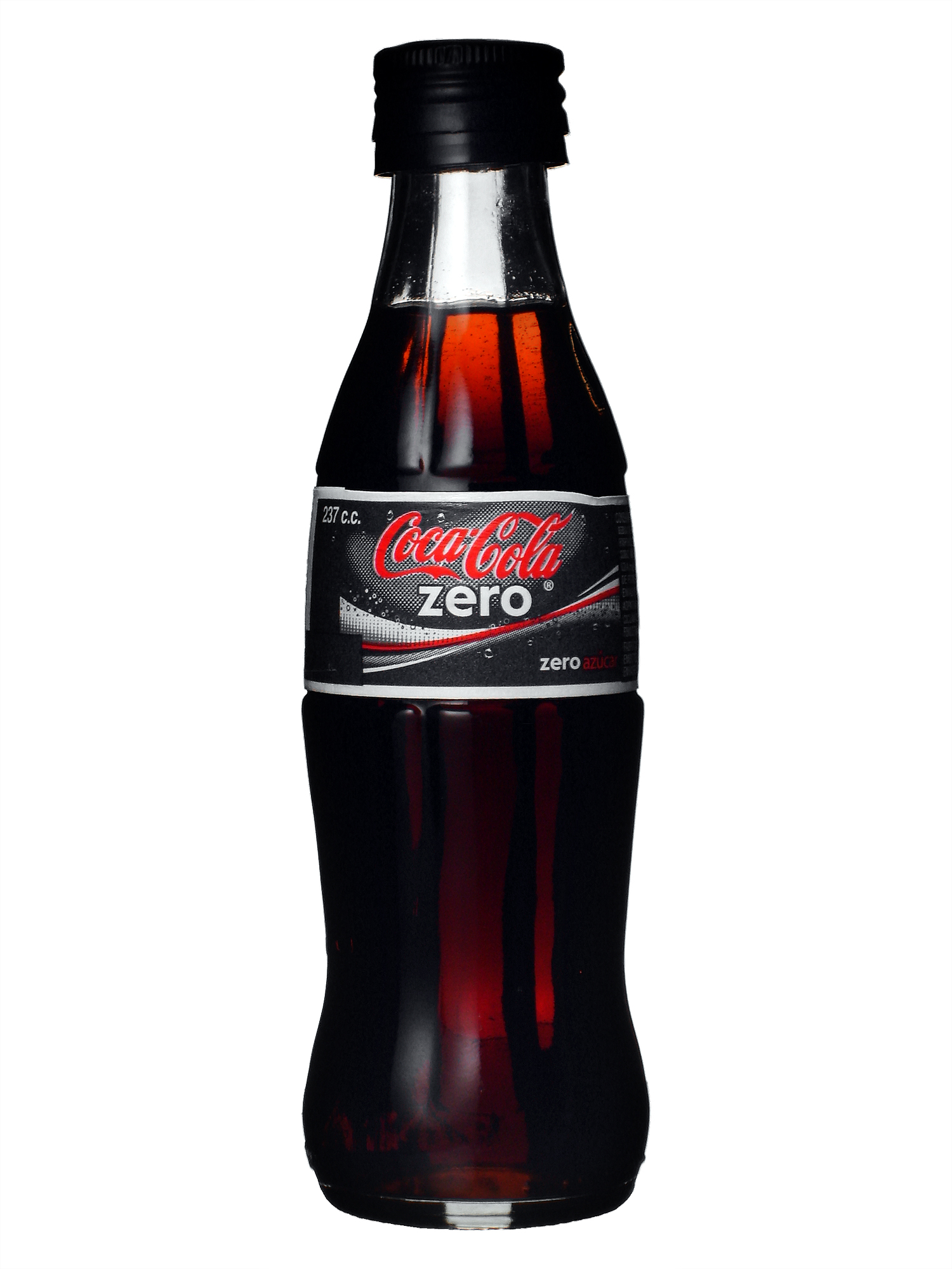 Botella de 237cc de Coca-Cola Zero, comercializada en Chile.